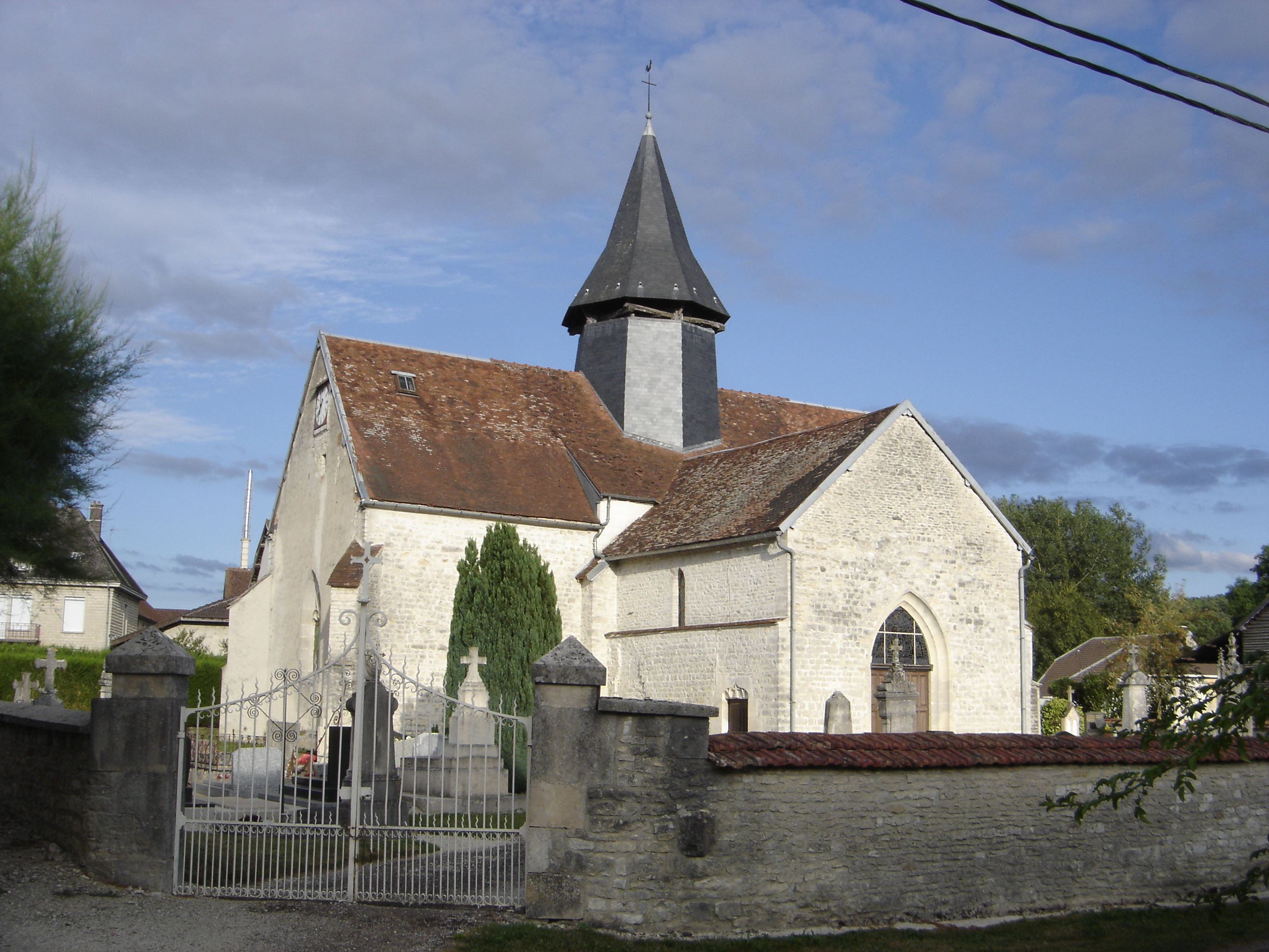 église de Buxières - Aube - France